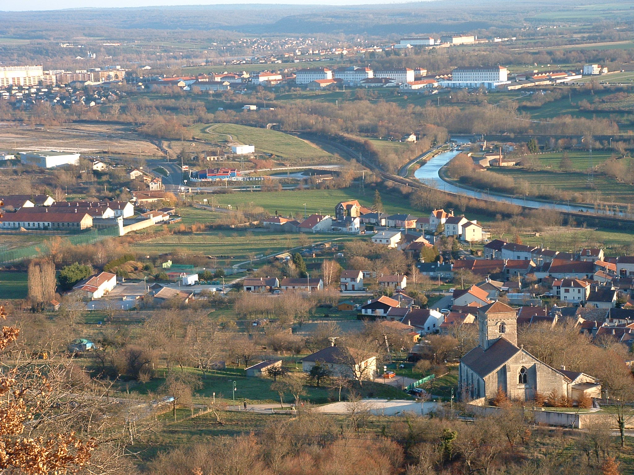 Vue du village d'Ecrouves depuis le plateau.